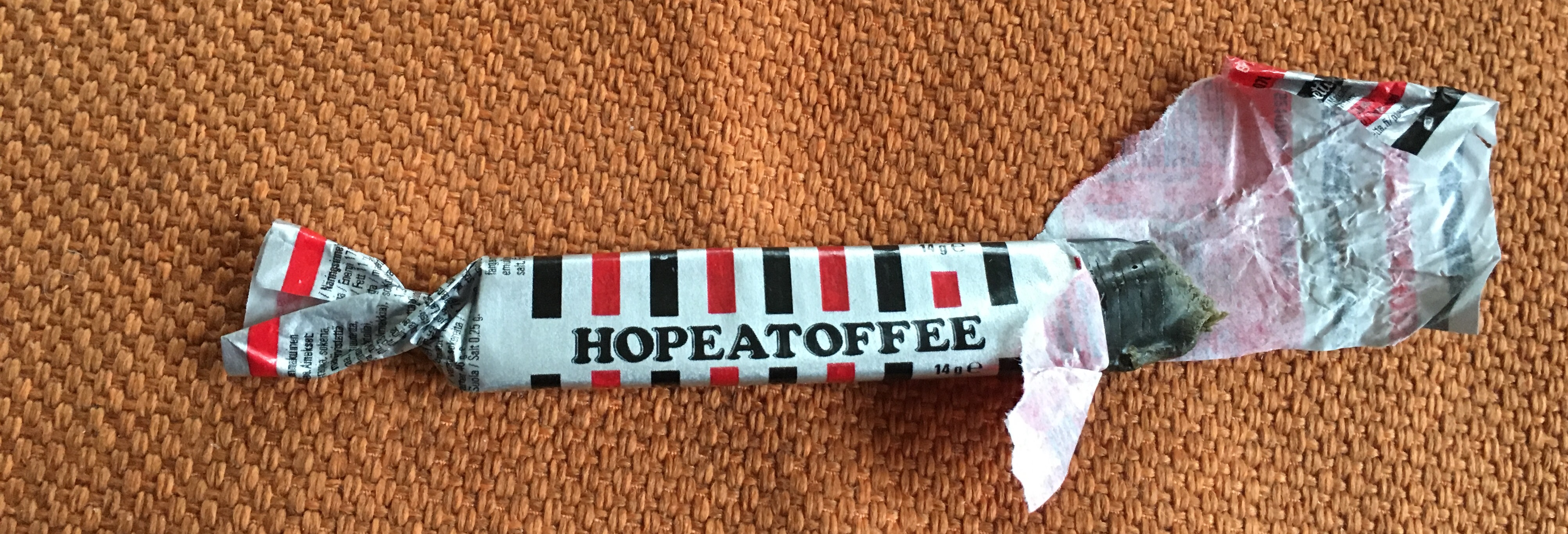 Hopeatoffee patukka